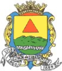 Brasão do Município de Tiradentes - MG